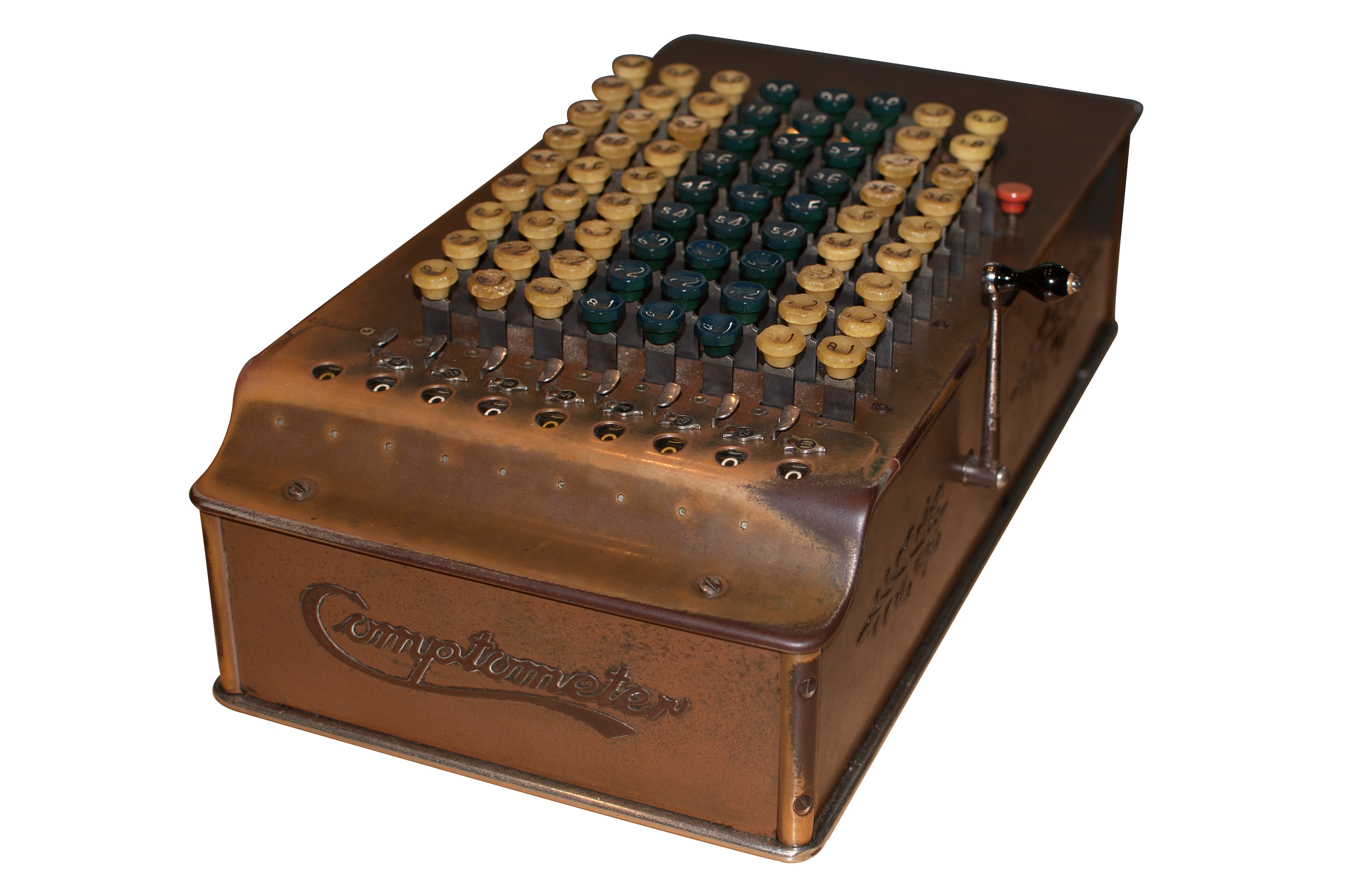 Comptomer, eine Rechenmaschine für Addition